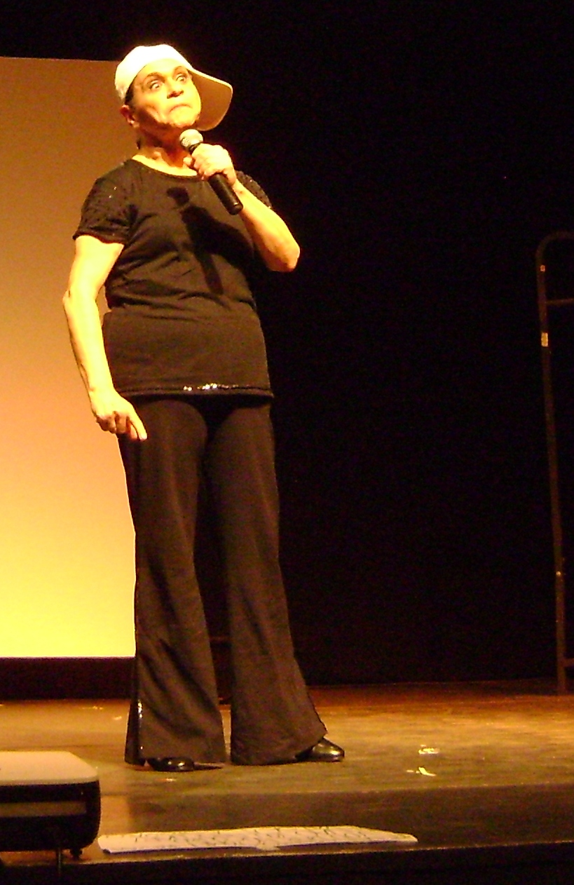 Fafy Siqueira, humorista brasileira, imitando o humorista brasileiro Ronald Golias no espetáculo "Doremifafy", em São Paulo.